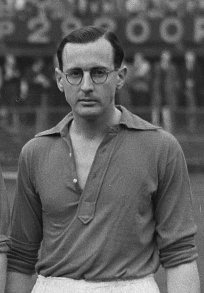 Joop Stoffelen.